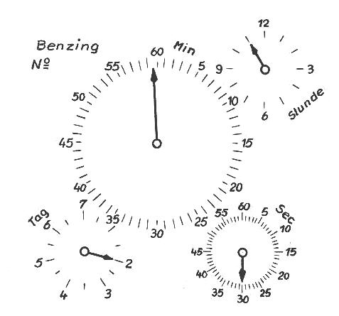 Analoger Stempeldruck einer Konstatieruhr